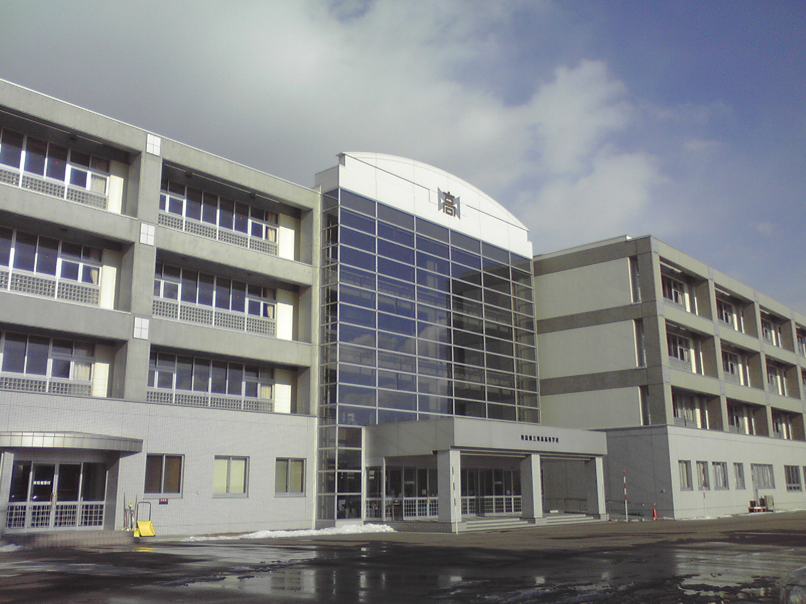 青森高校・正面玄関